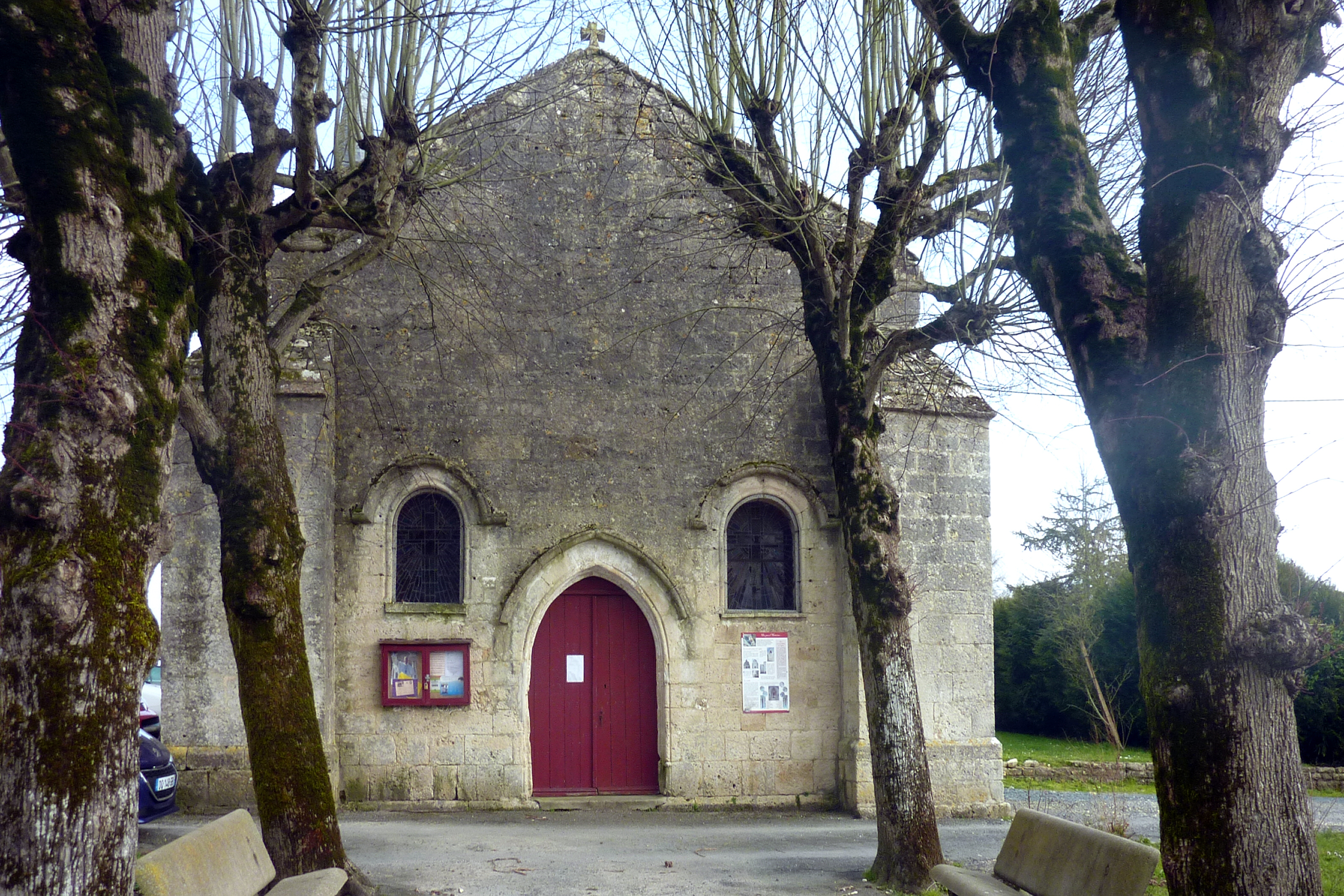 Église Saint-Pierre Landrais Charente-Maritime France